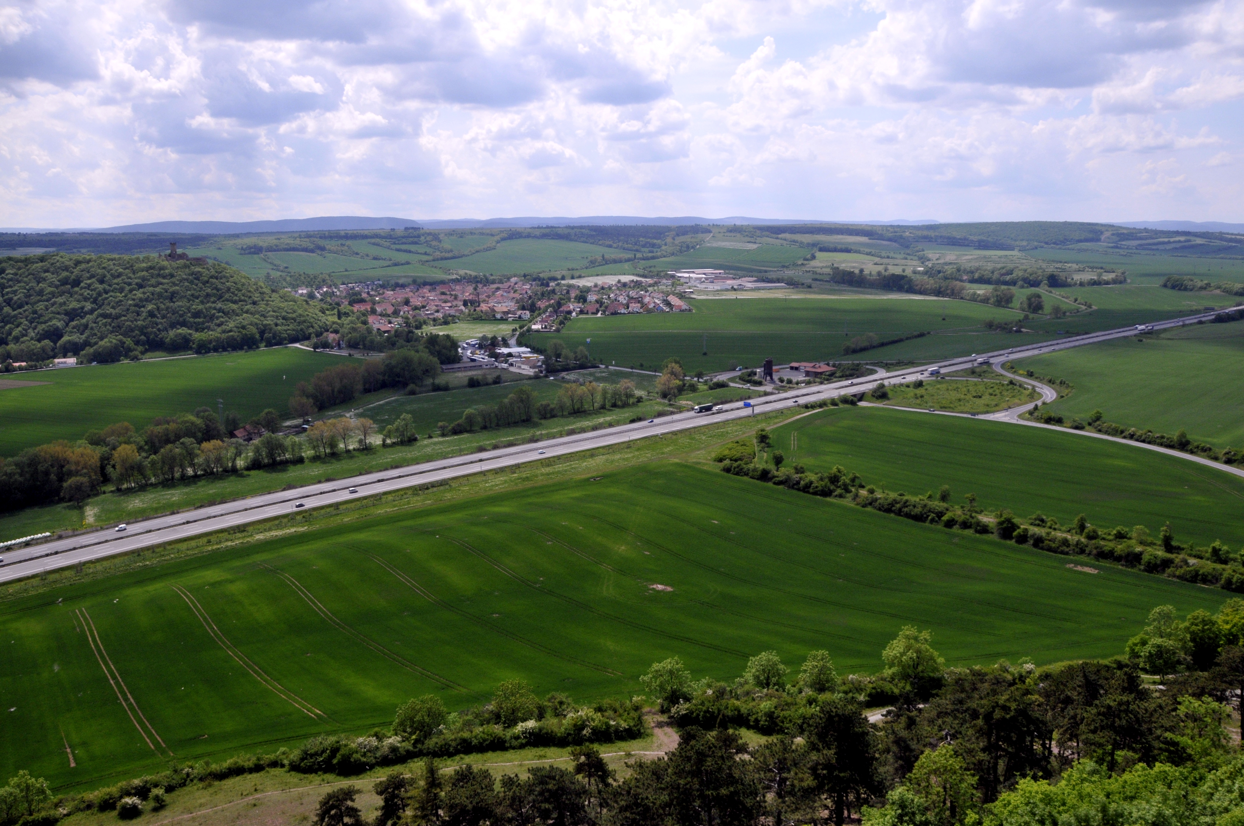 Autobahnabfahrt Wandersleben-Mühlberg der A 4, Blick von der Burg Gleichen, Mühlburg am linken Rand